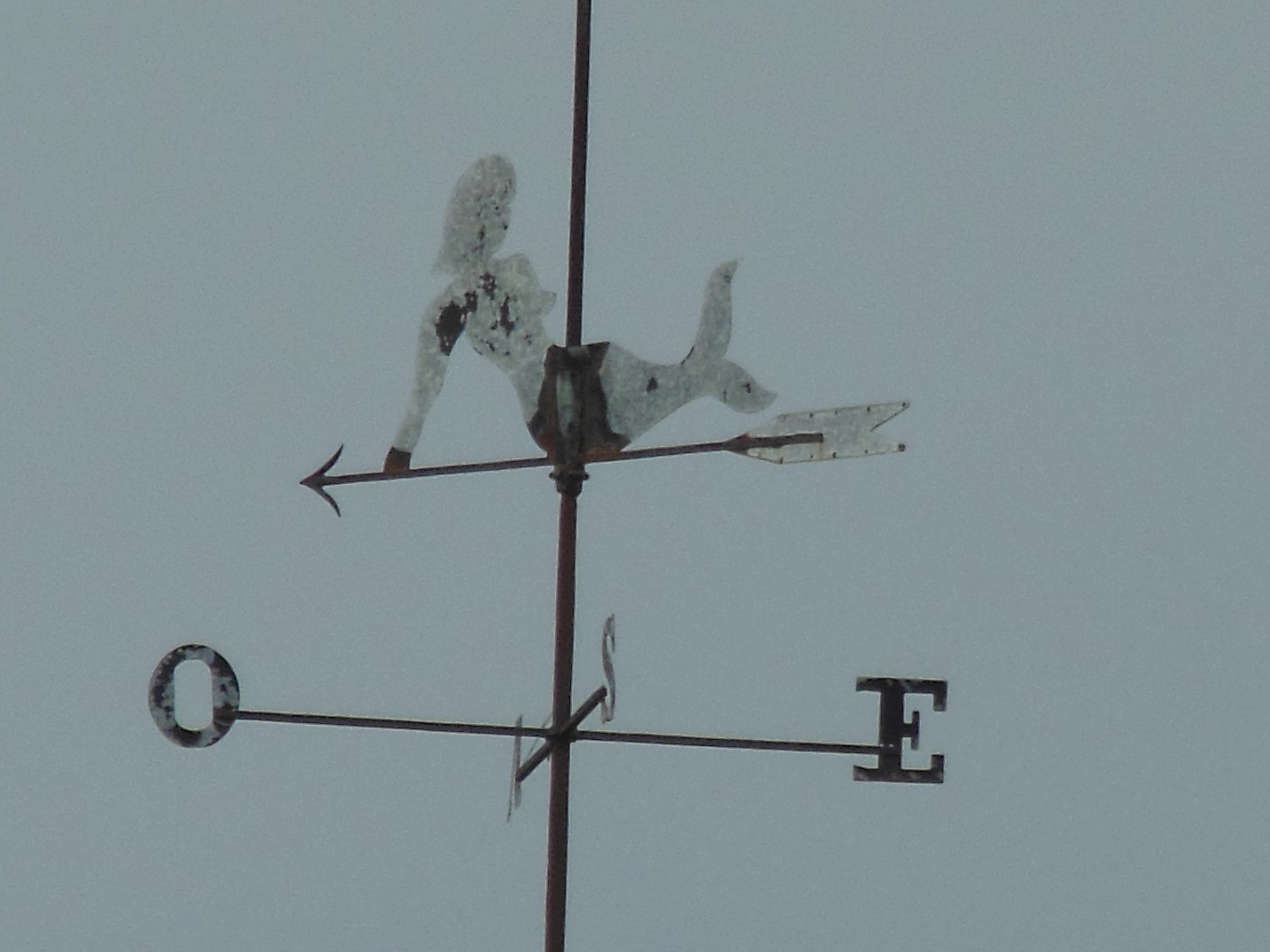 Girouette en forme de sirène du clocher-porche de Mimizan (Landes, France). Allusion au dicton : que Dieu nous préserve de la queue de la baleine, du chant de la sirène et du clocher de Mimizan.